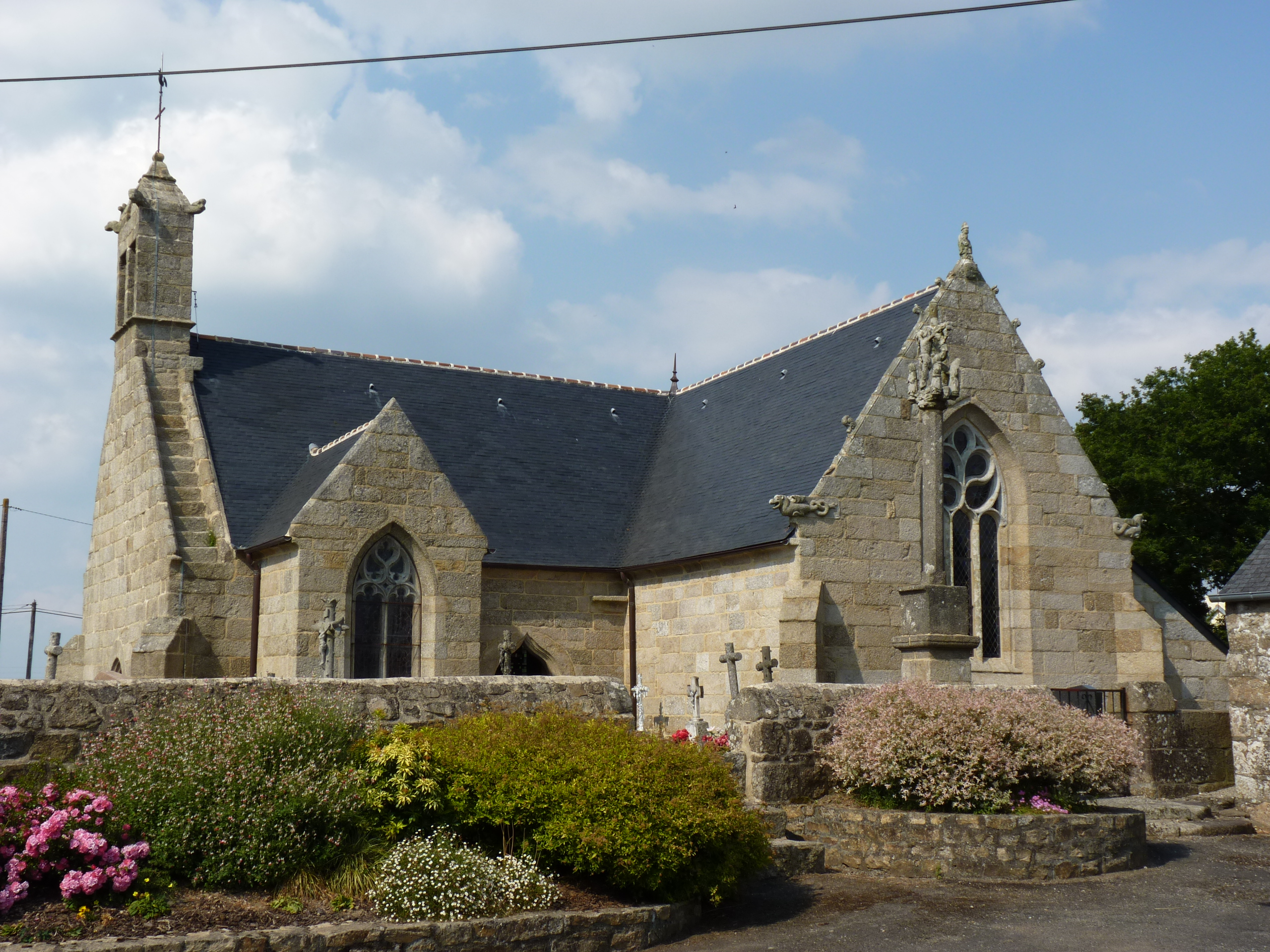 Église du 16ème siècle